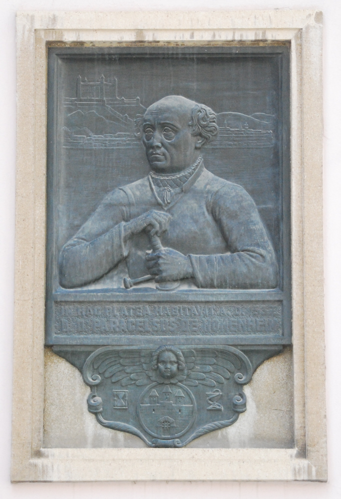 Gedenktafel für Paracelsus am erzbischöflichen Palais in Bratislava